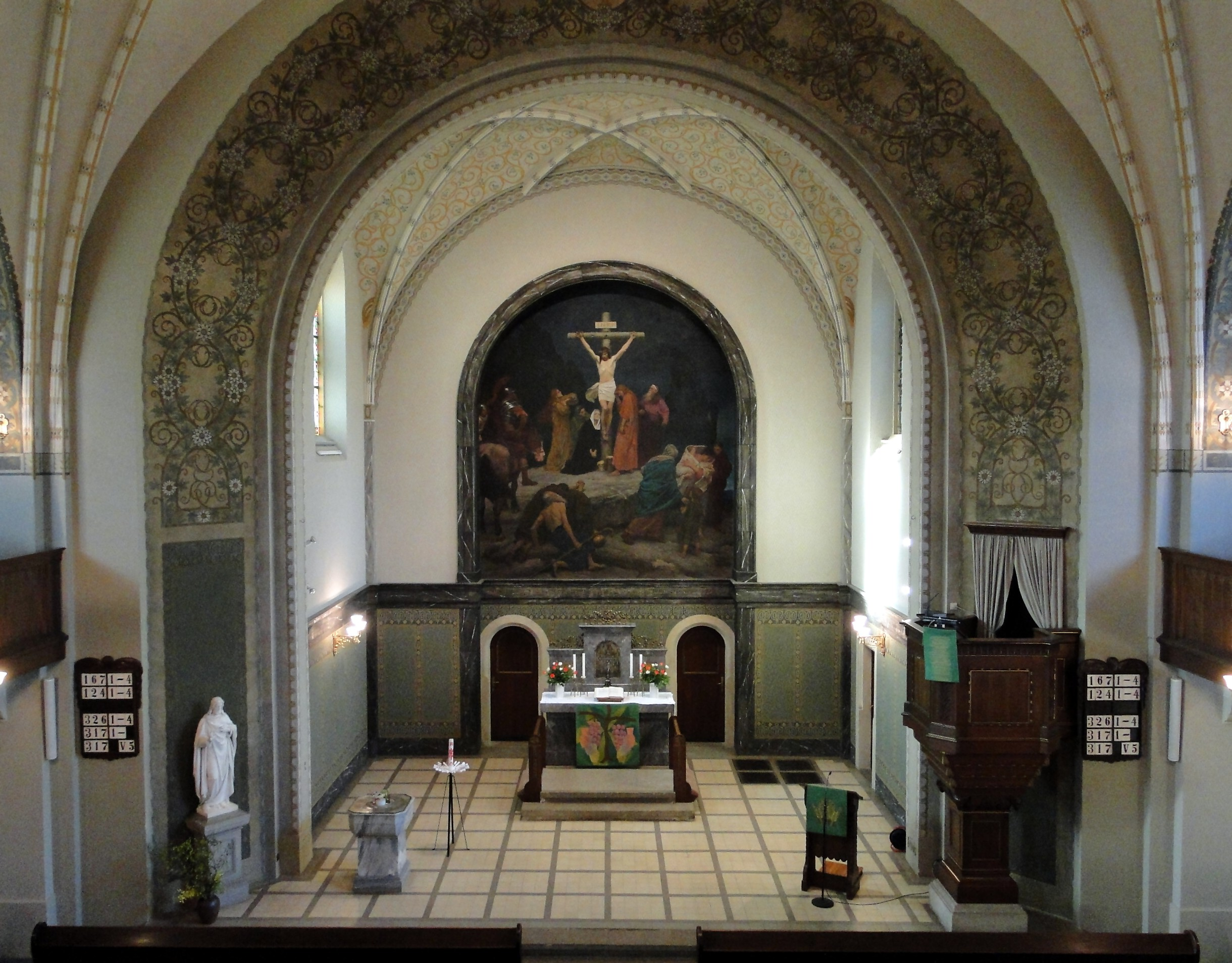 Christuskirche Dresden-Klotzsche Innenraum mit Blick zum Chor